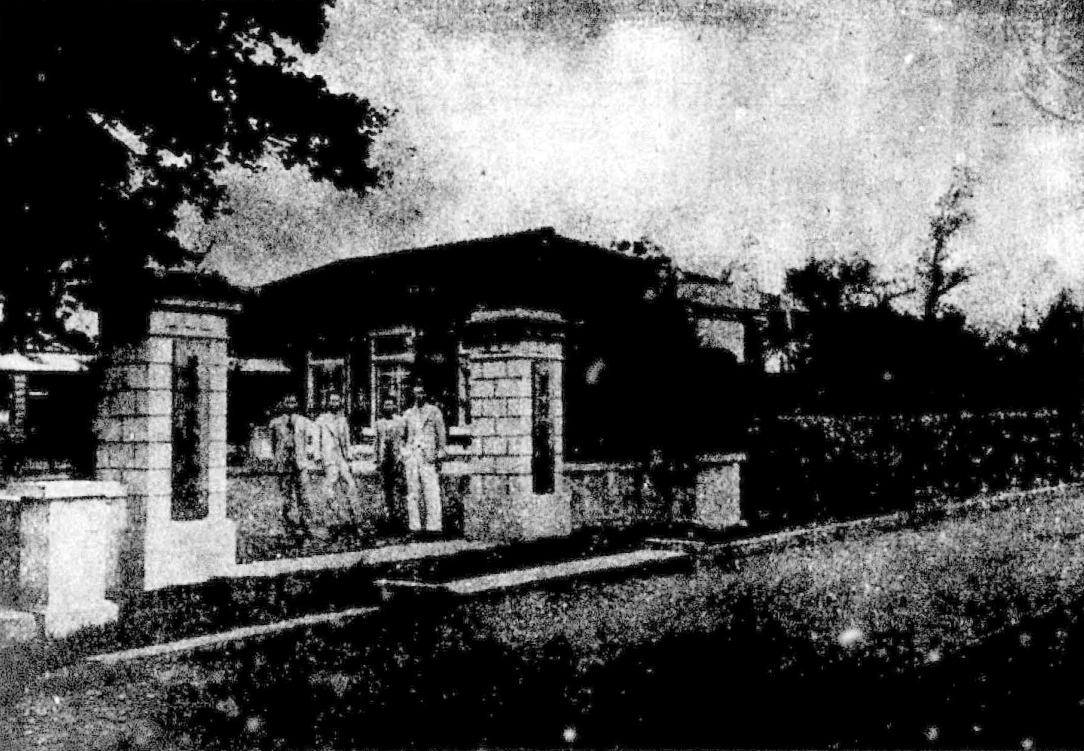 新竹州桃園郡蘆竹庄役場